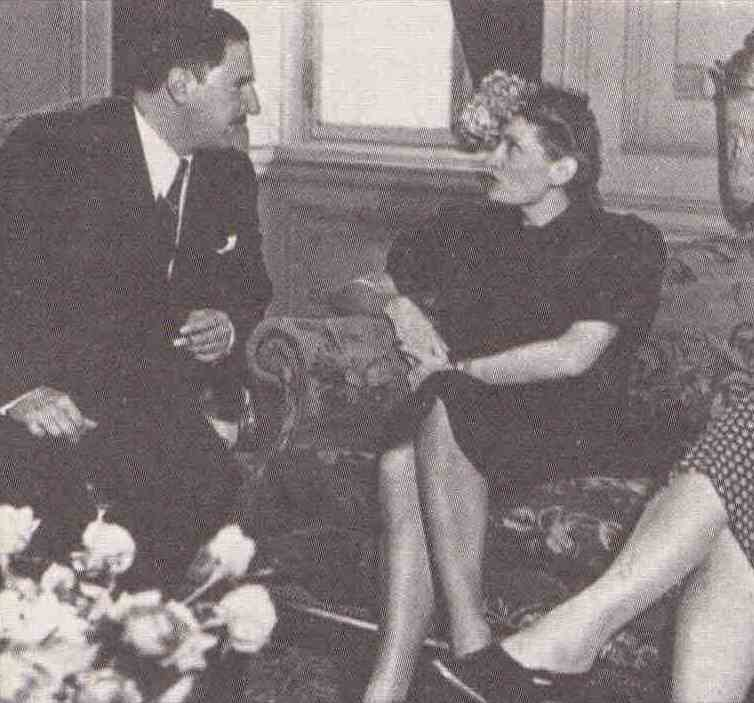 Edda Ciano Mussolini, filha do líder fascista Benito Mussolini, é recebida pelo então Interventor Federal de São Paulo, Adhemar de Barros.